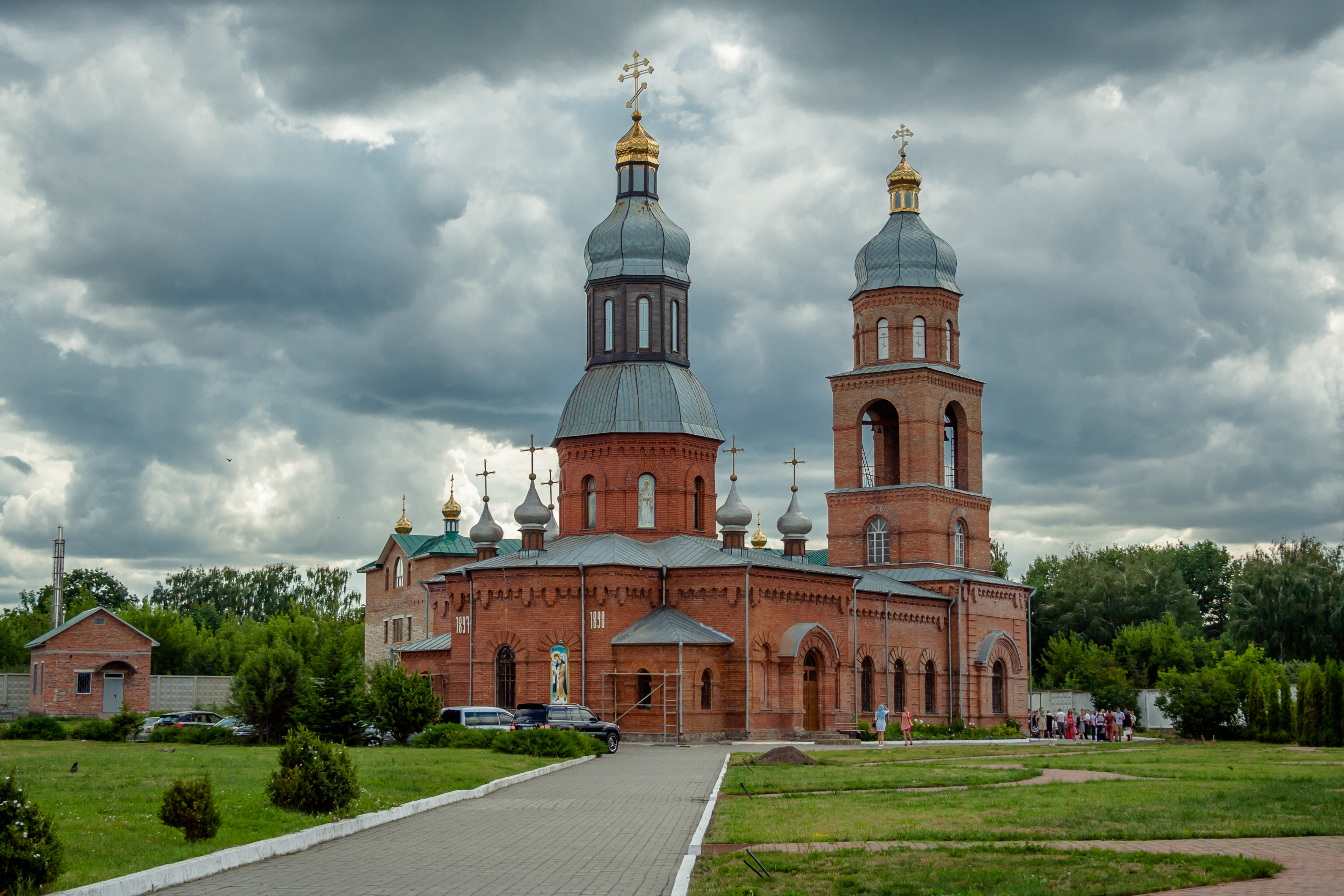 Храм Георгія Побідоносця, Хмельницький, вул. І. Франка